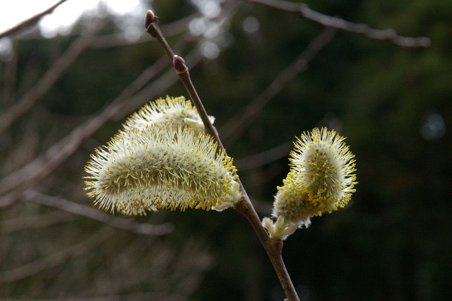 ネコヤナギ （山梨県山中湖村） Salix gracilistyla (Yamanakako-Village, Yamanashi, JAPAN)